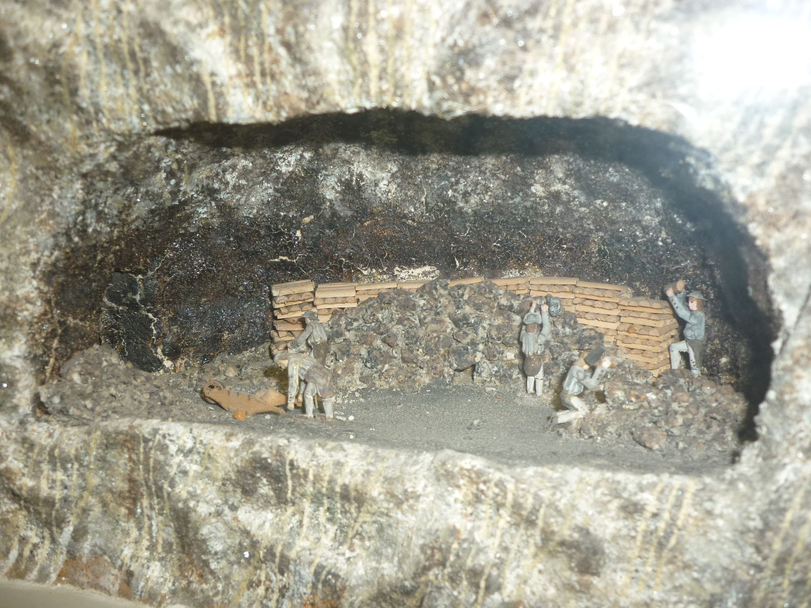 Feuersetzen. Modell im Deutschen Museum München, Abteilung Bergbau